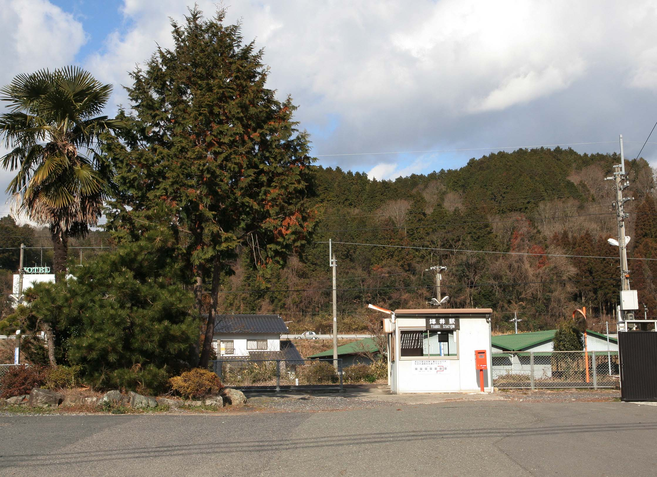 坪井駅の駅舎